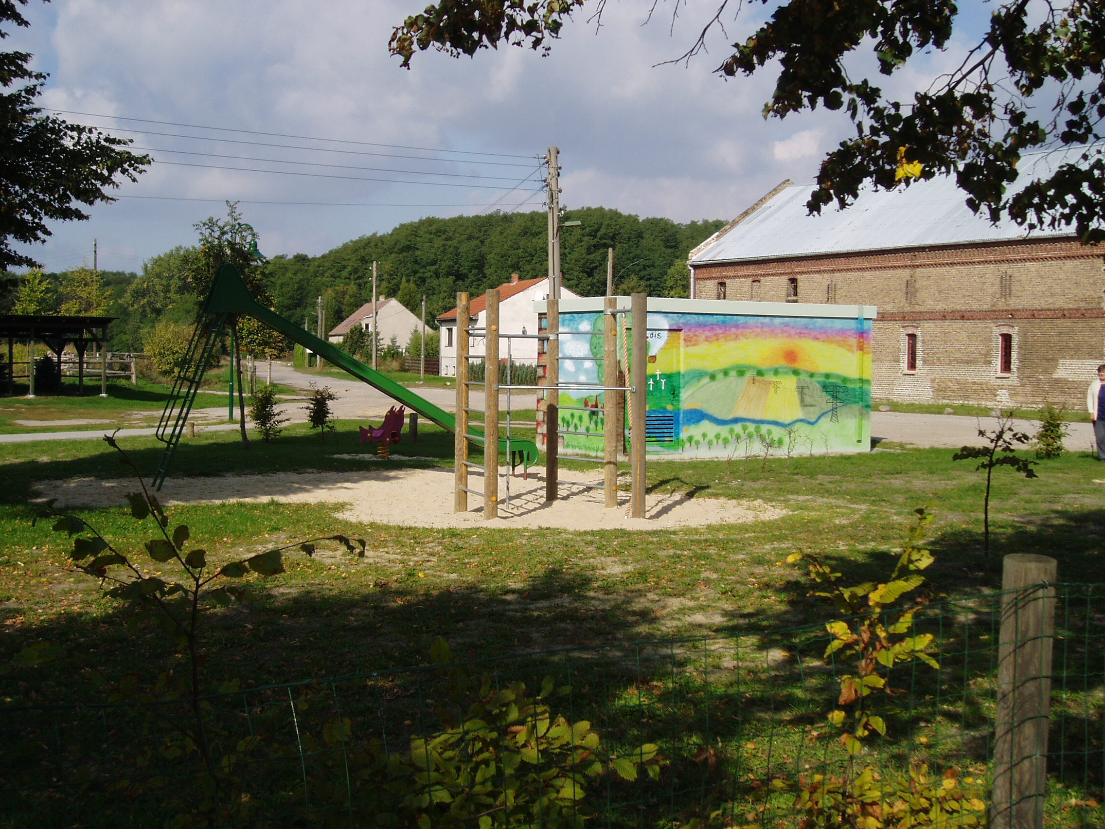 Der Spielplatz in Gohlitz, Nauen, Land Brandenburg